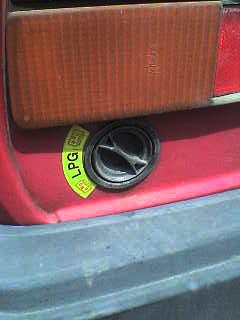 car connector for LPG